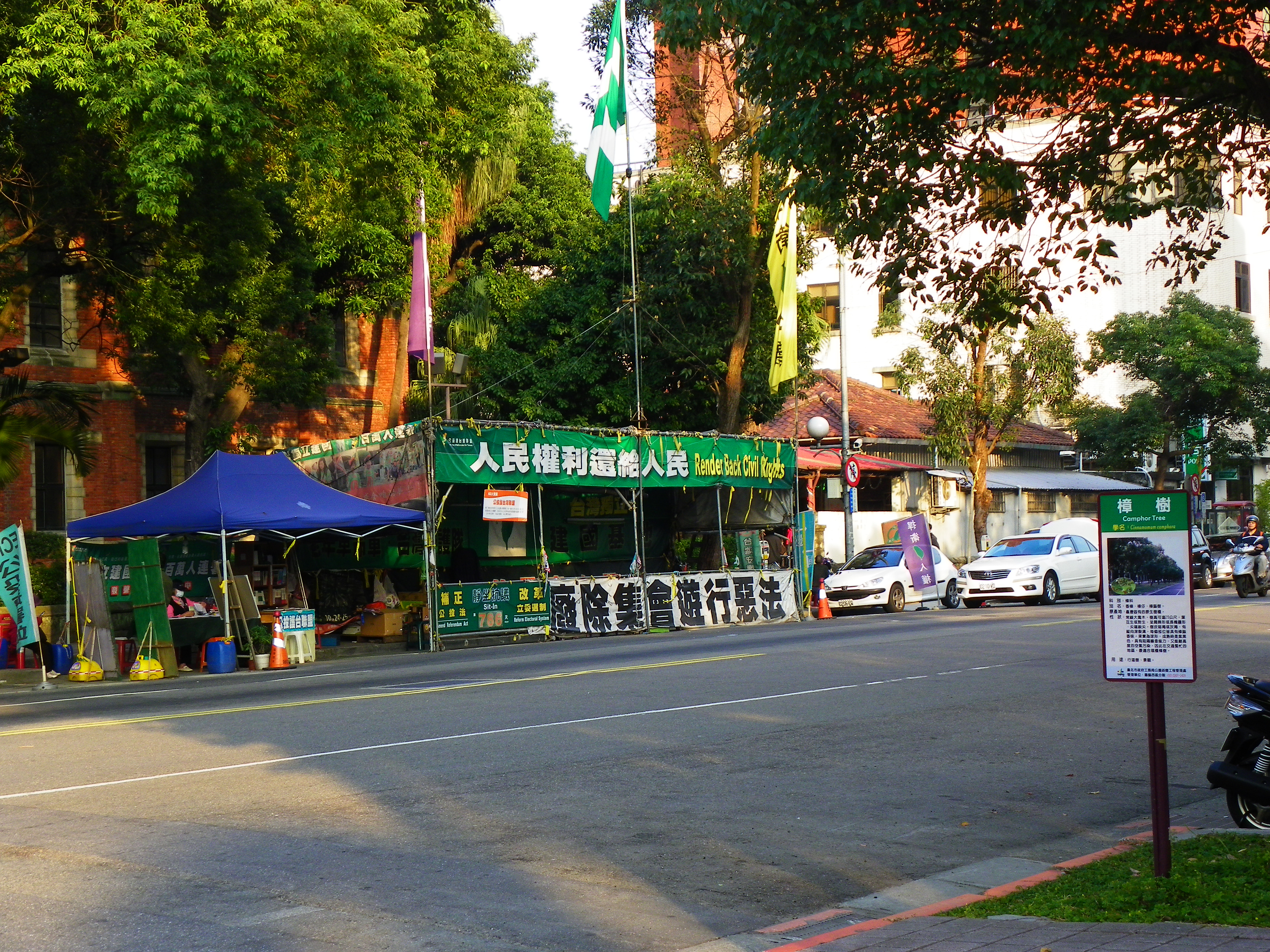 臺北市中正區濟南路與中山南路口，濟南基督長老教會南側、立法院群賢樓附近，公投護台灣聯盟長期駐紮抗議、要求廢止《集會遊行法》的帳篷。公投護台灣聯盟稱此帳篷為「建國基地」，帳篷中央懸掛臺灣獨立運動旗幟「臺灣旗」。此帳篷於2018年3月23日遭臺北市建築管理工程處強制拆除。